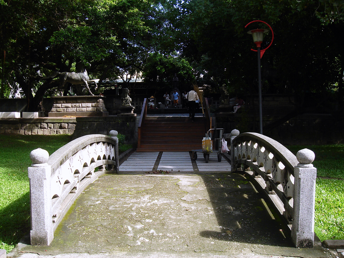 中文（台灣）: 臺中神社石橋。